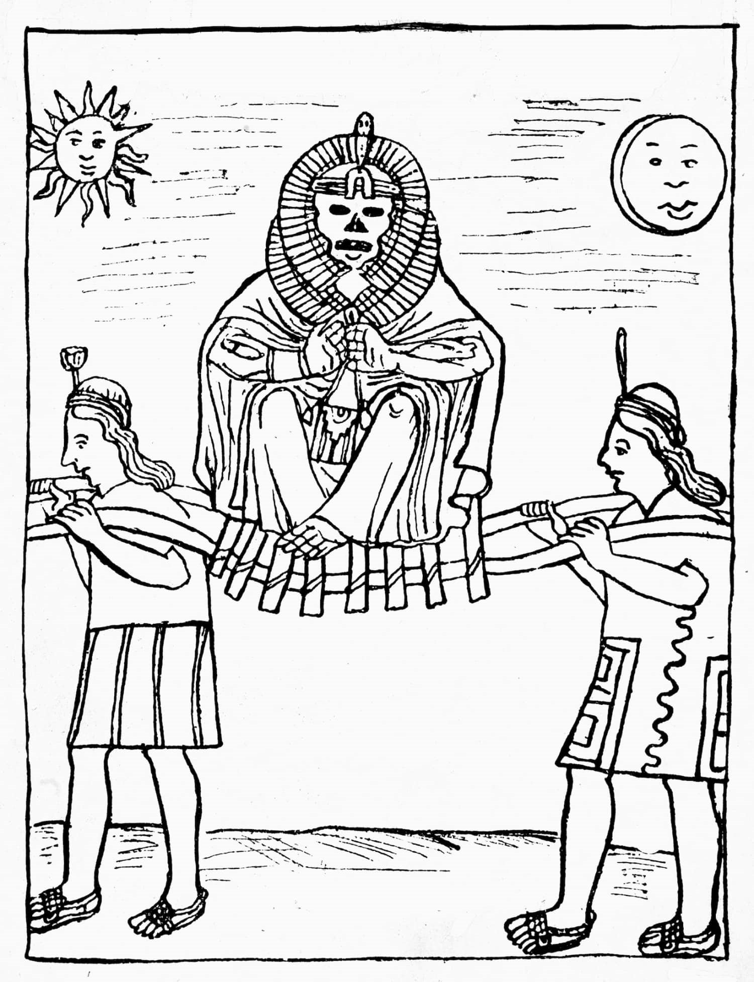 Illustration from the book El primer nueva corónica y buen gobierno